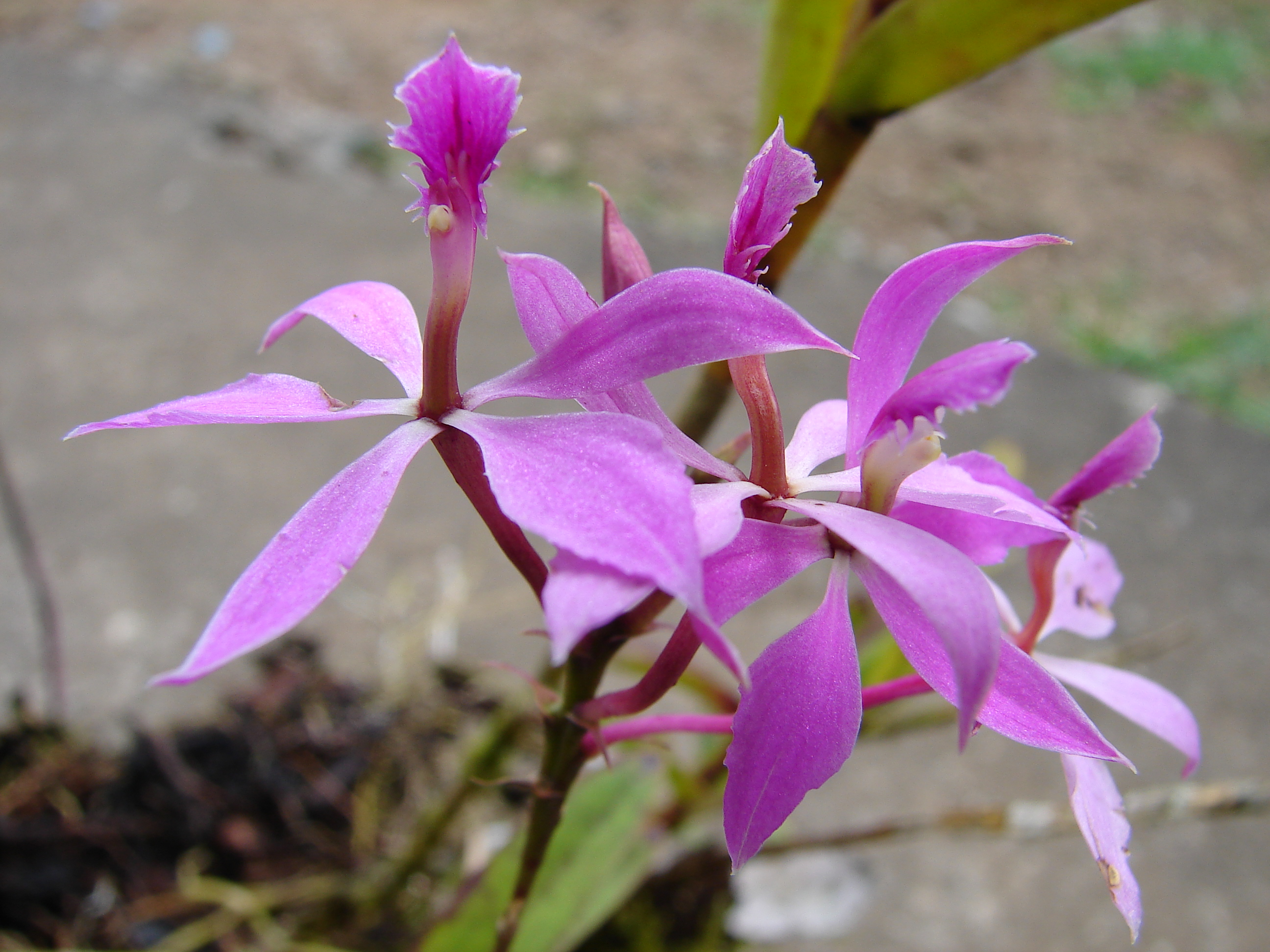 foto de Epidendrum imatophyllum